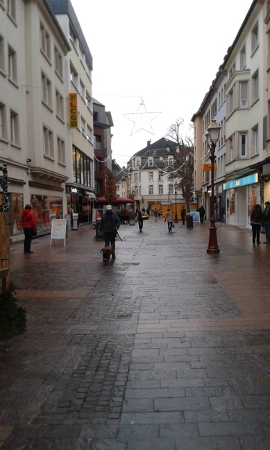 Zone piétonne d'Ettelbruck, Luxembourg